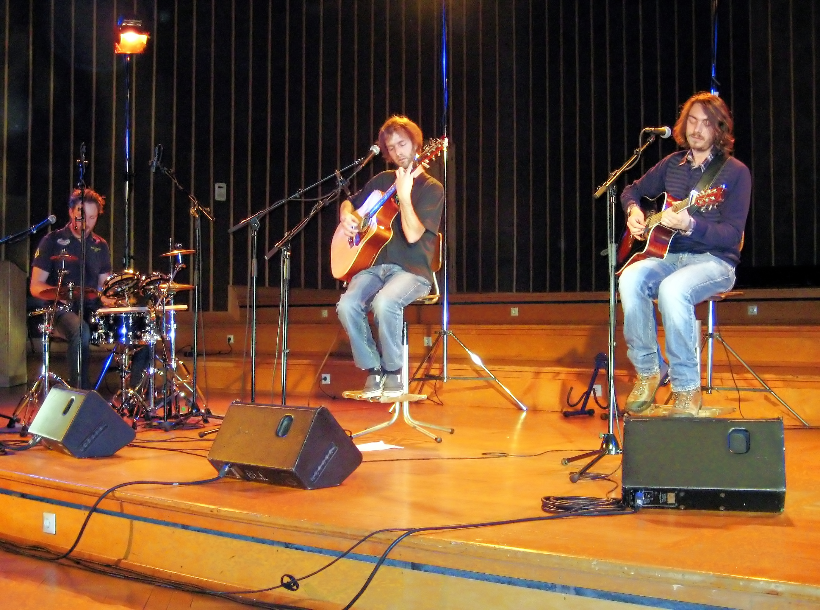 Tim McMillan Trio (Australien) bei einem Benefizkonzert am 31. März 2009 im „Sendesaal Bremen“ in Bremen. Von links: Matt Crute (Percussion, Gesang), Tim McMillan (Gitarre, Gesang), Shisha PM (Gitarre, Gesang).